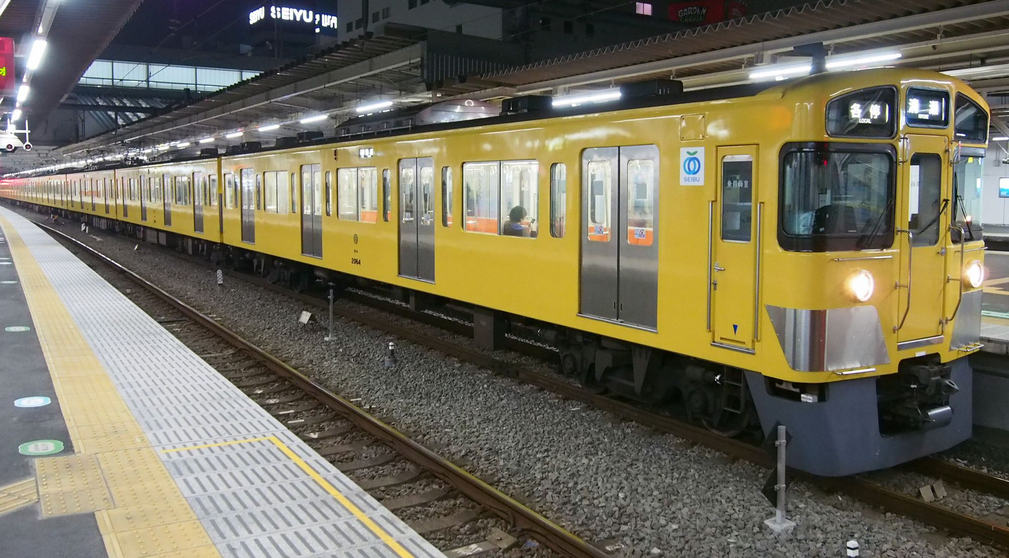 主に池袋駅または地下鉄線から朝夕時間帯と15時台の上り池袋行き1本が設定されている清瀬発着の各駅停車。西武ドームでプロ野球もしくは各種コンサートなどの開催日には、西武球場前駅からも運転されることがある。（2016年2月22日、所沢にて）